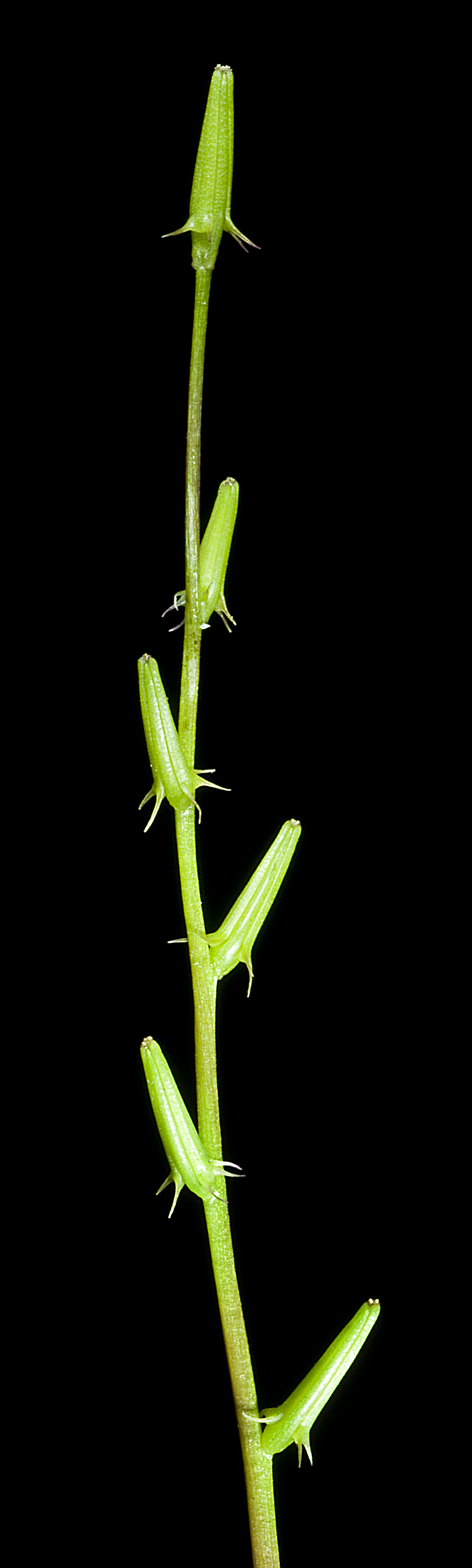 KRT4074